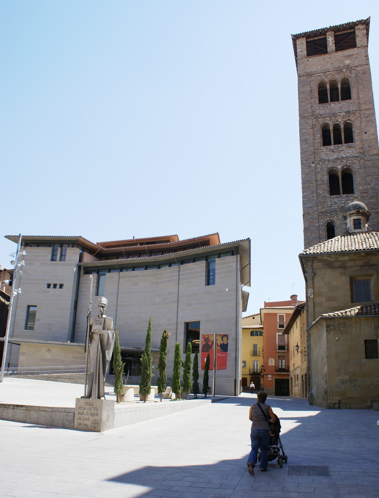 Vic, façana del Museu Episcopal, escultura de l'Abat Oliba i campanar de la Catedral